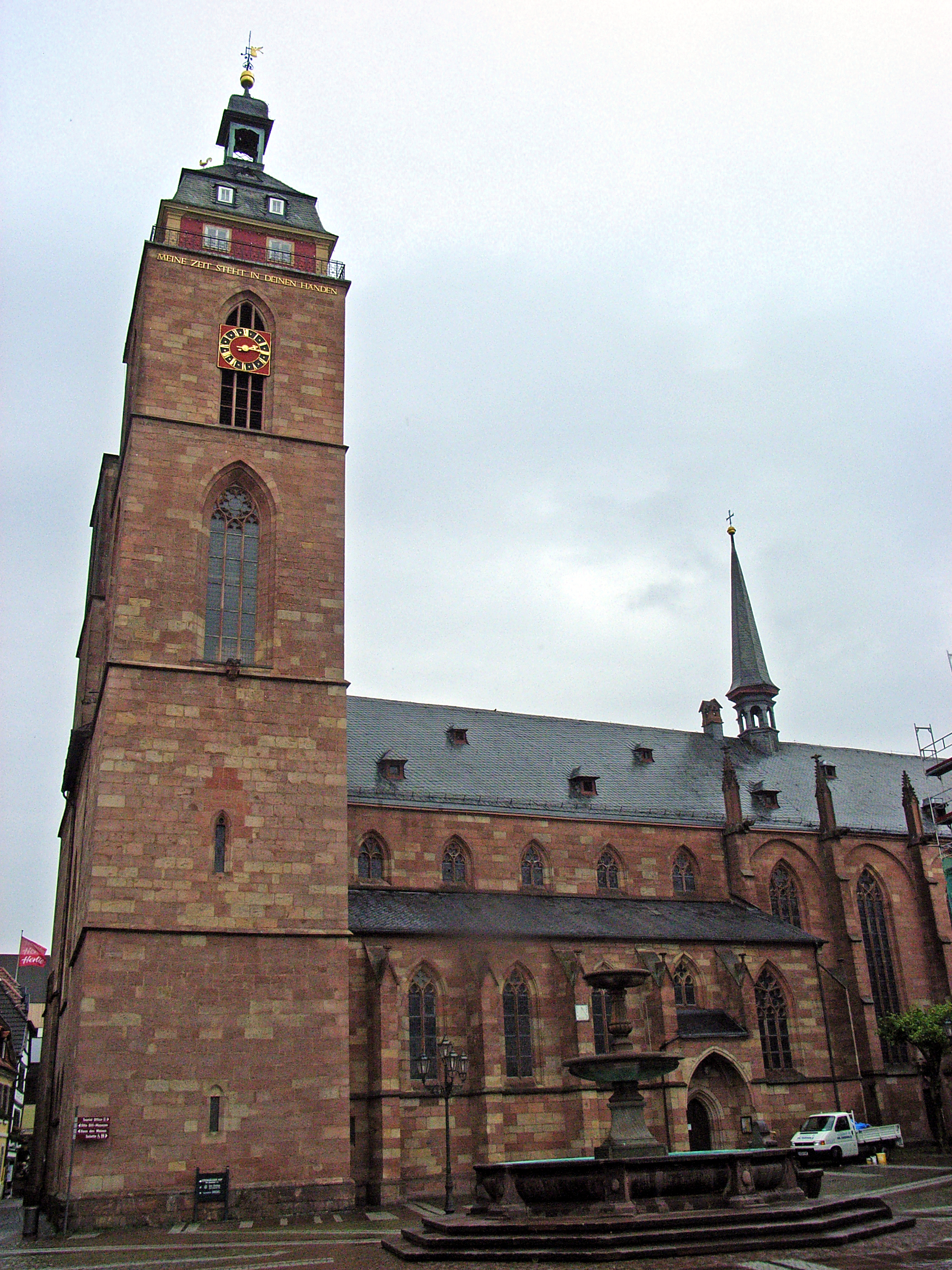 Dieses Bild zeigt die Stiftskirche von Neustadt an der Weinstraße.